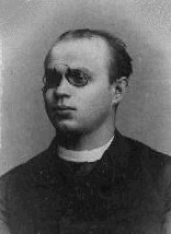 Viktor Pinkava, katolický kněz a historik